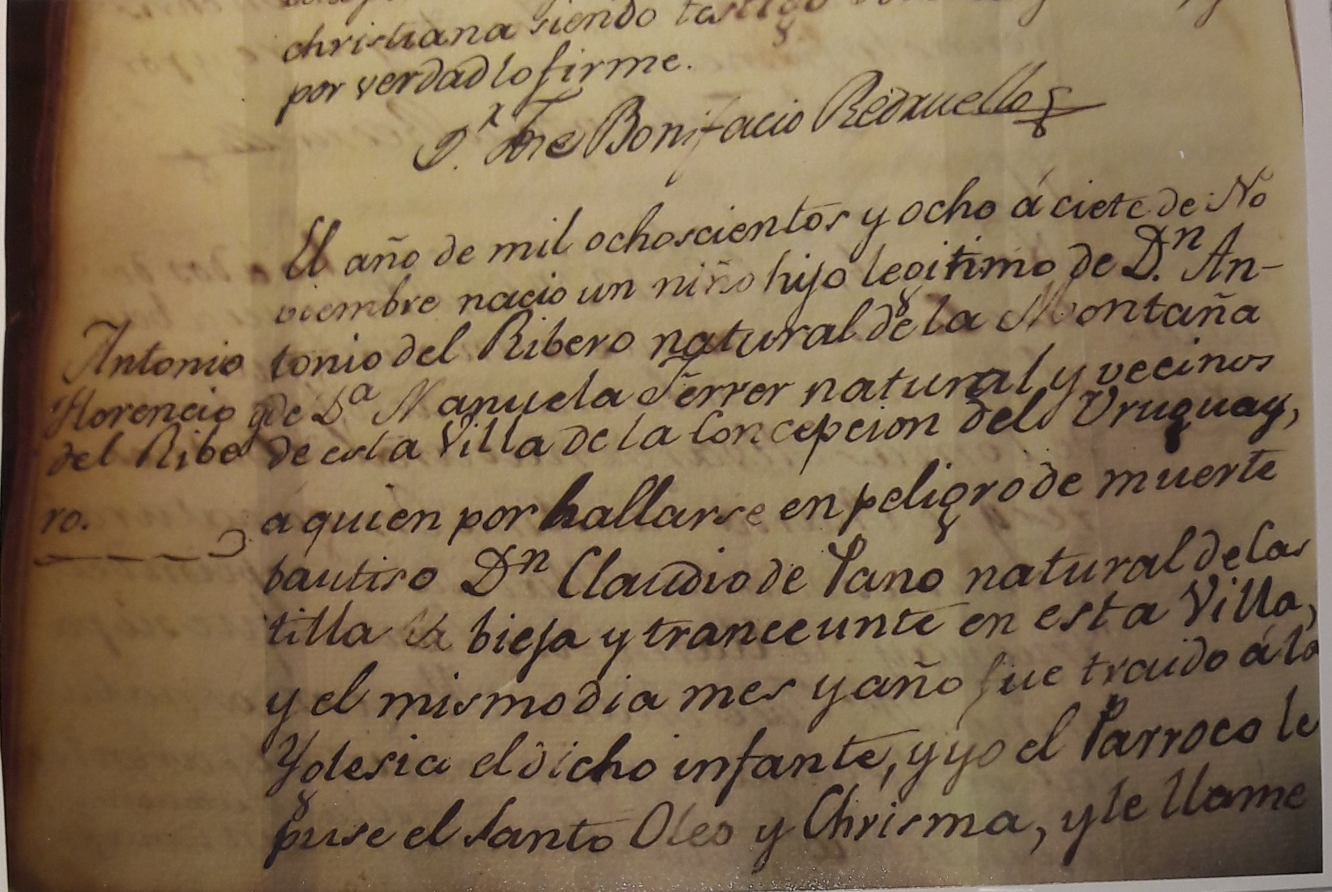 Partida de nacimiento del Gaucho Rivero. Museo Malvinas, Núñez, Buenos Aires, Argentina.